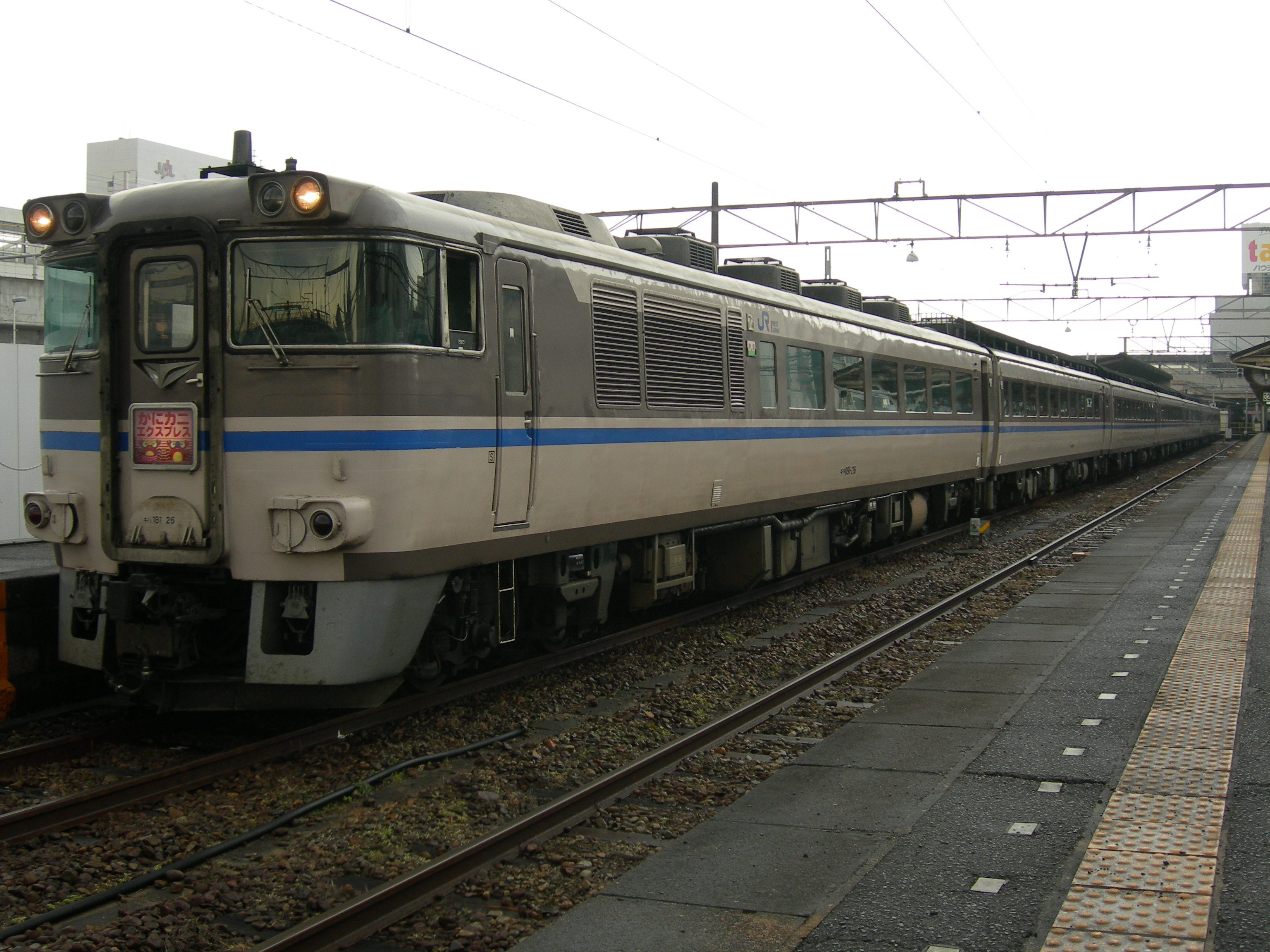 かにカニはまかぜ号